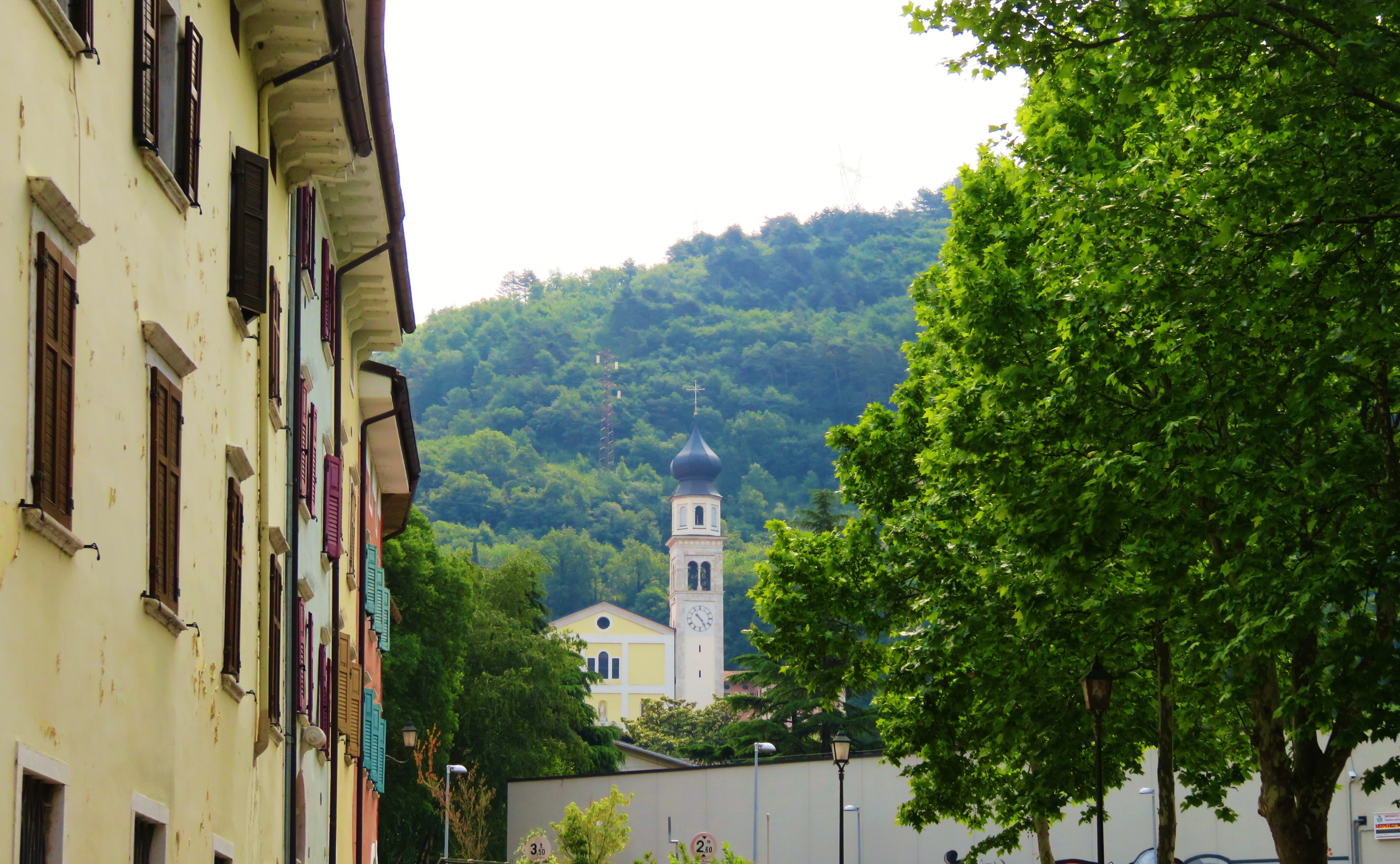 Vista della chiesa dalla parte bassa del paese di Ala, zona piscina.